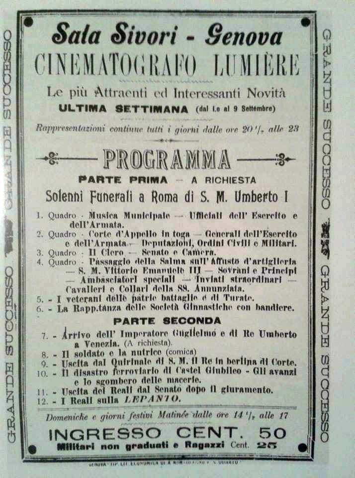 Programma Sala Sivori ora Cinema Sivori dal primo al nove settembre 1900